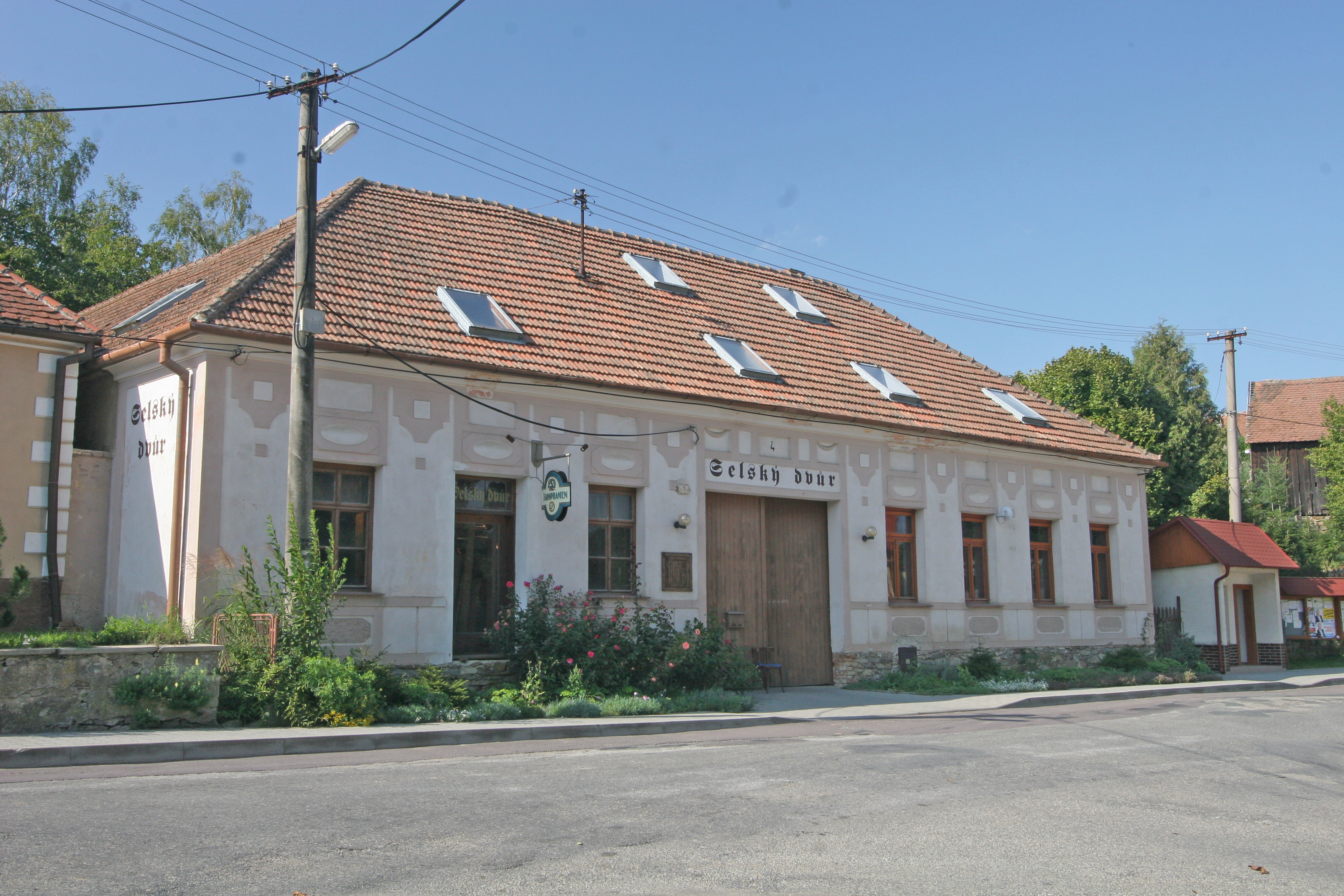 Vysočany čp, 5